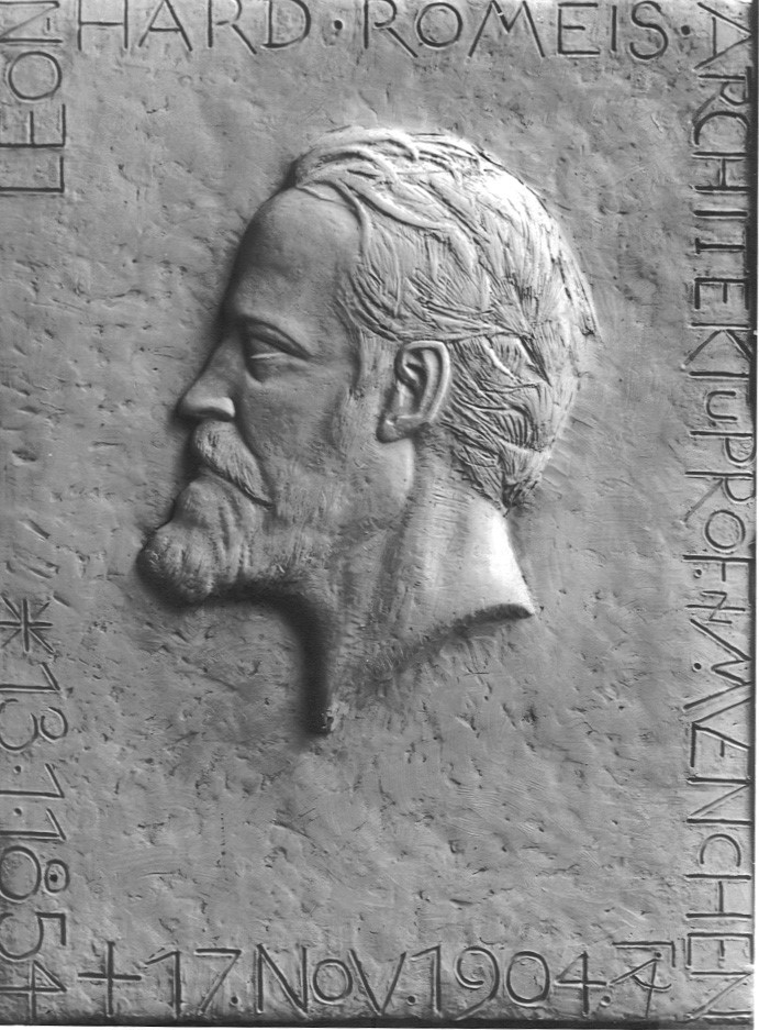 Bronzetafel, gegossen von seinem Sohn